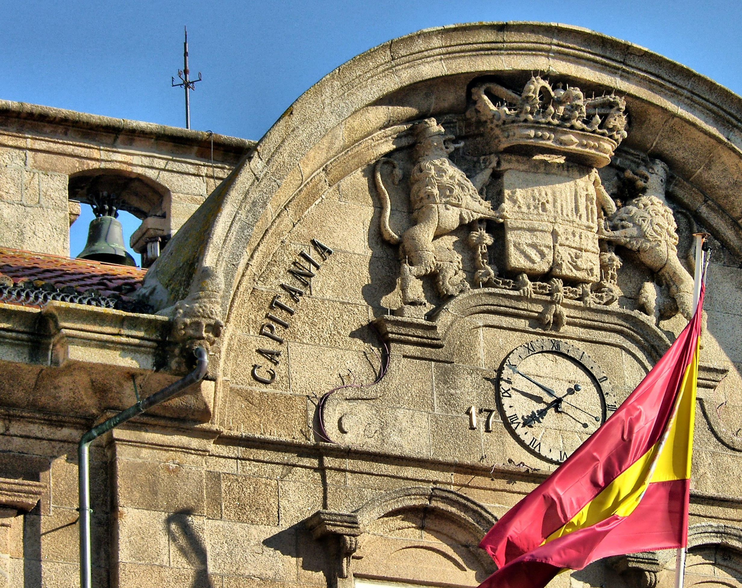 Inaugurado en 1752 y diseñado por Juan Vergel y Francisco Llovet, el palacio sustituyó al antiguo edificio de madera que acogía la Capitanía coruñesa desde 1582, y su coste para los gallegos fue un impuesto de un maravedí por cada azumbre de vino que se cosechase en la región. La estructura interior del edificio responde a la doble intención con la que fue creado, pues hasta el siglo XIX, el Capitán General era el encargado tanto de las responsabilidades militares de cada región como de impartir justicia. Por eso el edificio de la Ciudad Vieja tiene dos puertas. Por este mismo motivo el palacio cuenta con un campanario. La existencia de esta estructura y la planta de su patio central lleva a muchos visitantes a la confusión de creer que el edificio puede tratarse de un antiguo monasterio, pero el campanario es únicamente un símbolo de poder, no de carácter religioso. Precisamente el patio del recinto, de estilo neoclásico y presidido por sendos bustos de bronce -de Juan Carlos I y de Fernando VI Los pisos superiores del edificio albergan la zona noble del palacio, esas que solo que utilizan para celebraciones como la Pascua Militar. El llamado pasillo de los espejos alberga una colección de pintura barroca, cedida por Museo del Prado, y mobiliario tan distinguido como lámparas de la granja y espejos antiguos, y desemboca en la sala del trono, la habitación con más contenido simbólico del recinto. En esta estancia el Capitán General celebra, cada 6 de enero, la recuperación de Menorca al ejército inglés en 1782.